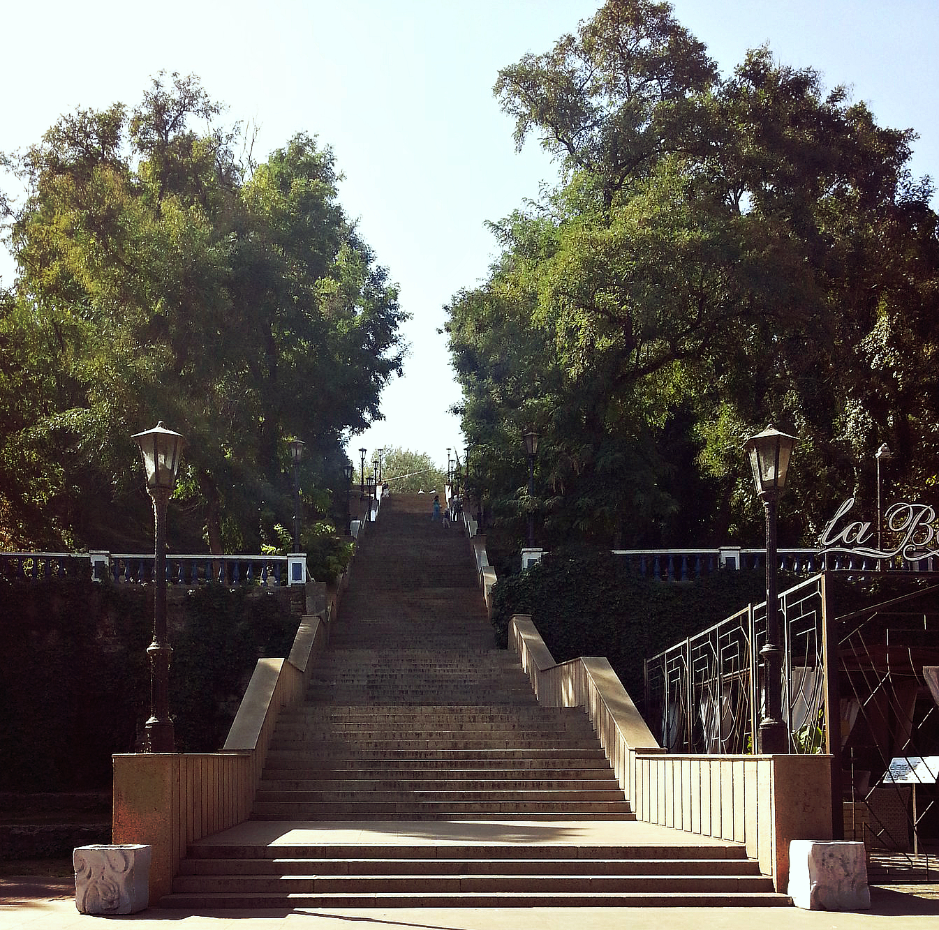 Каменная лестница, комплекс застройки улицы: улица Греческая, Таганрог, Ростовская область